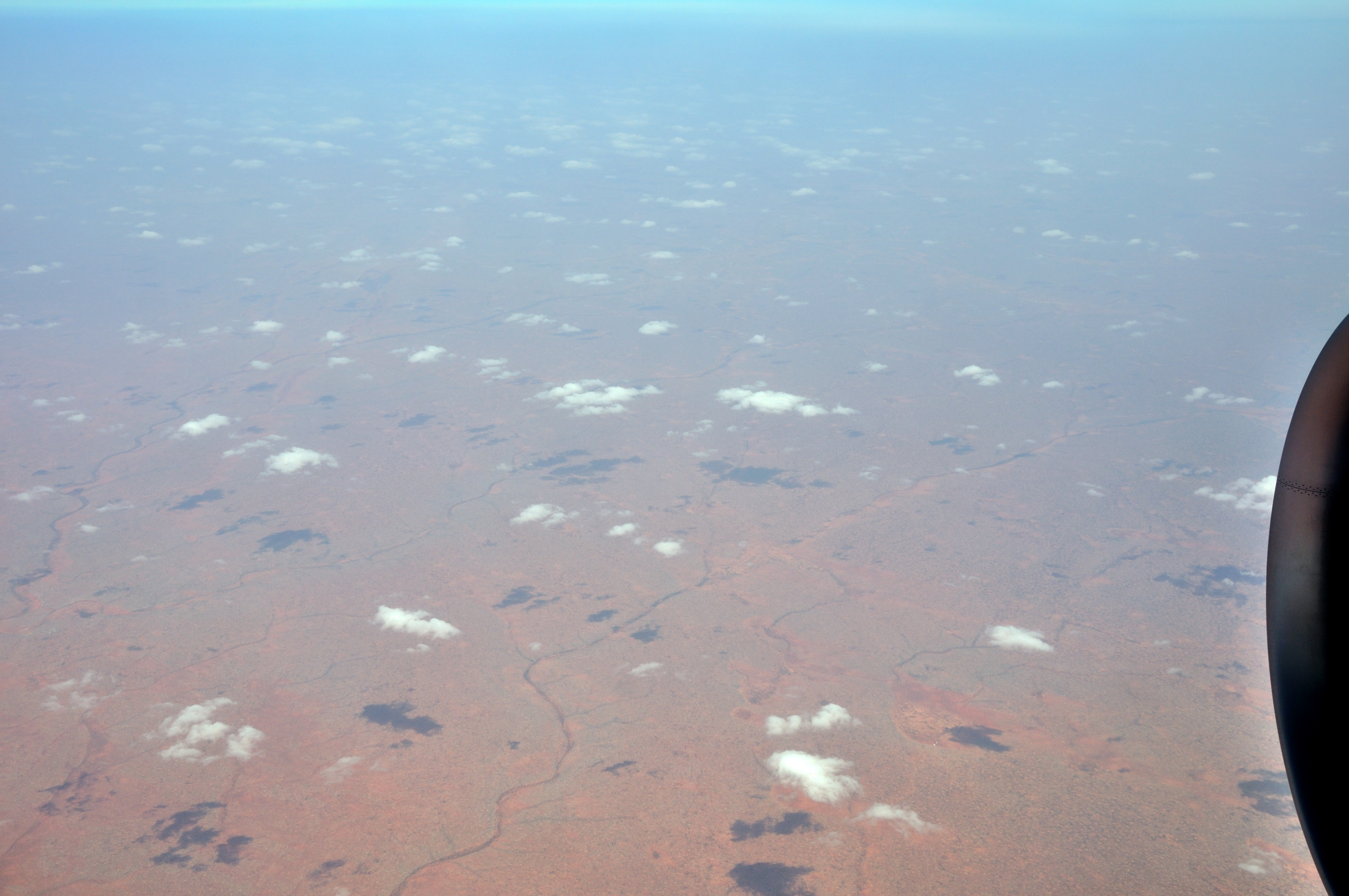 Overhead Sarax Darandoole, Somalia